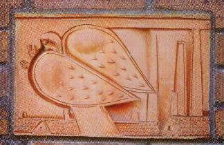 Roelsdorf01